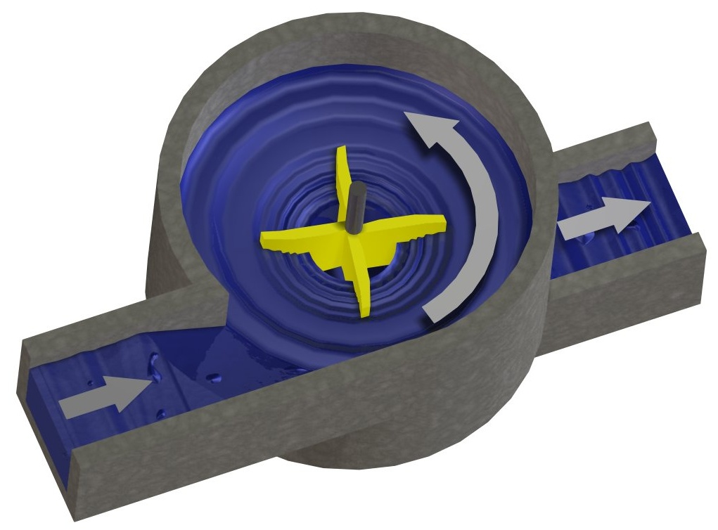 Wasserwirbelkraftwerk. Die Technik beruht auf einem runden Staubecken mit einem zentralen Abfluss. Über dem Abfluss bildet sich ein stabiler Wasserwirbel aus, der eine Turbine antreibt.